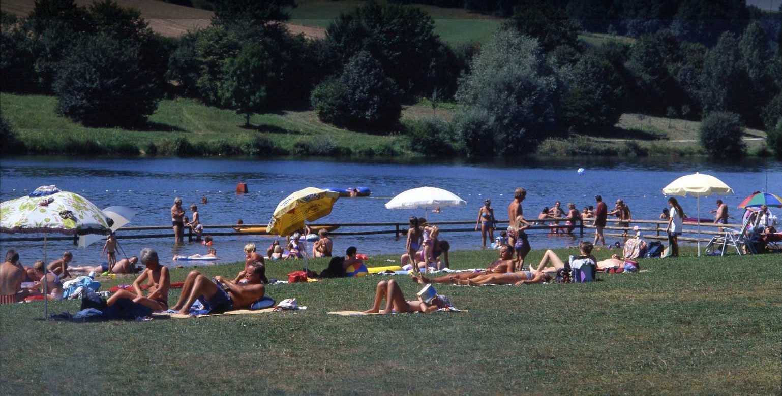 Hahnenkammsee